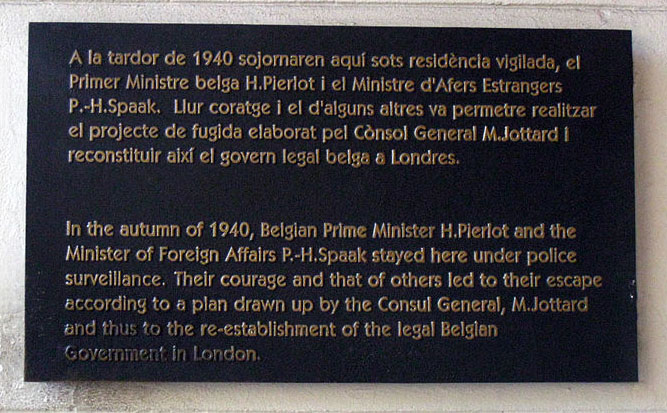 Als polítics belgues a l'exili H. Pierlot i P.H. Spaak. Pg. de Gràcia, 68 (Barcelona)